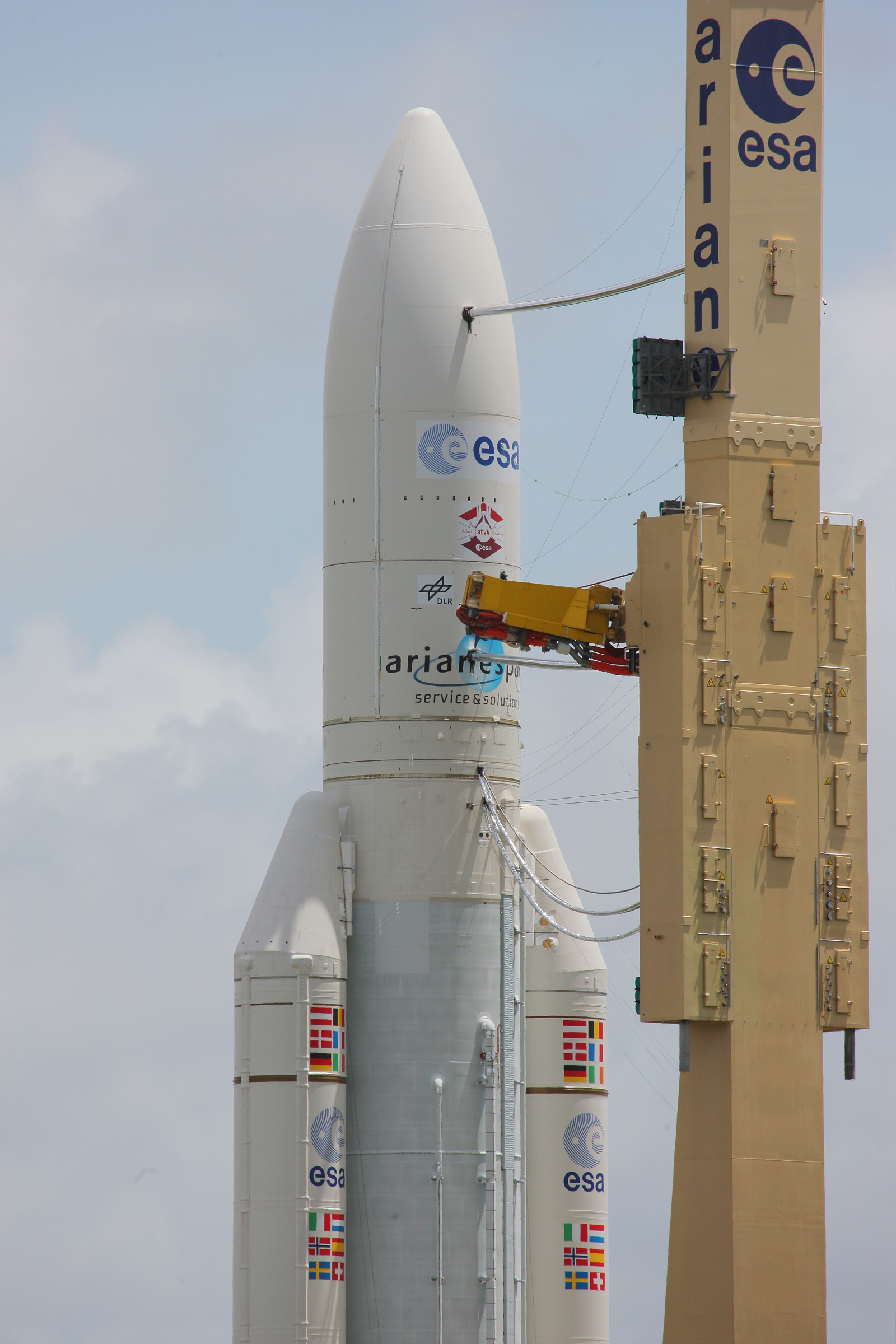 Raumfrachter ATV-4 "Albert Einstein" Ariane 5ES mit "OCAM"-Kamerasystem Gemeinsam mit Partnern hat das DLR in den vergangenen Jahren das On-Board-Kamerasystem "OCAM" entwickeln lassen, mit dem sich der Flug der Ariane-Rakete verfolgen lässt. Das OCAM-System ist eine eigenständige Komponente, die auf der Ariane 5 als Passagier mitfliegt. Der Höhepunkt des OCAM-Einsatzes wird die Beobachtung des Absetzens von ATV-4 im Orbit sein. Für dieses Ereignis wird OCAM dreidimensionale Video-Sequenzen aufnehmen, um das dynamische Verhalten der Raumfahrzeuge während der Separationsphase zu studieren. Damit eröffnet sich für die Ingenieure des ATV-Projekts eine völlig neue Möglichkeit, den Erfolg ihrer Arbeit zu beobachten und zugleich für die Zukunft wichtige neue Erfahrungen zu sammeln. Credit: DLR/Thilo Kranz (CC-BY 3.0) 2013